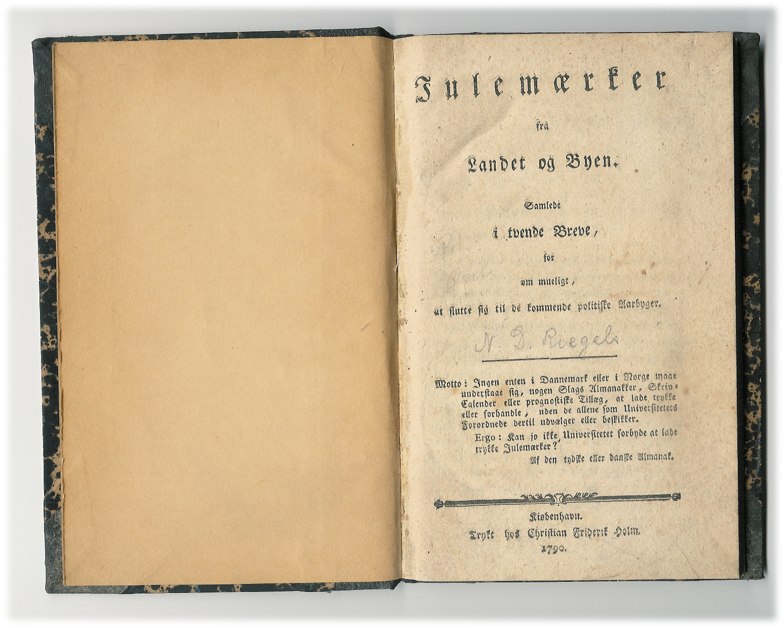 The book "Julemærker from Landet og Byen" by Niels Ditlev Riegels. 1790